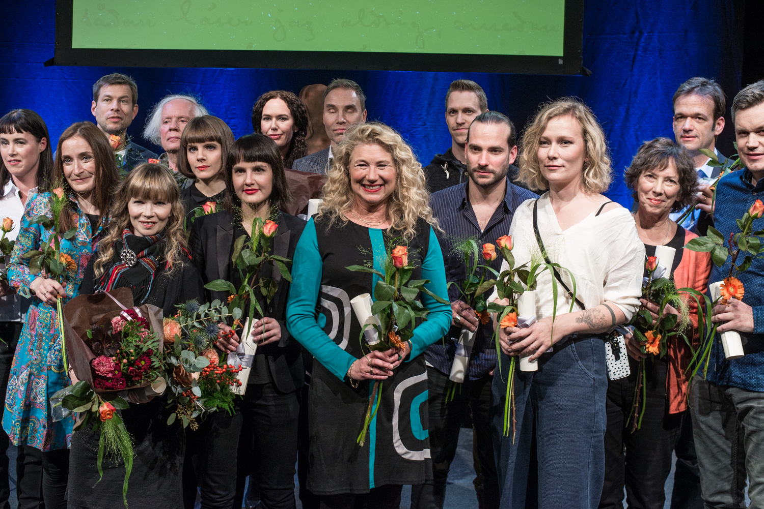 De nominerade för Augustpriset 2016 i de olika priskategorierna presenteras den 24 oktober 2016 på Kulturhuset Stadsteatern i Stockholm.